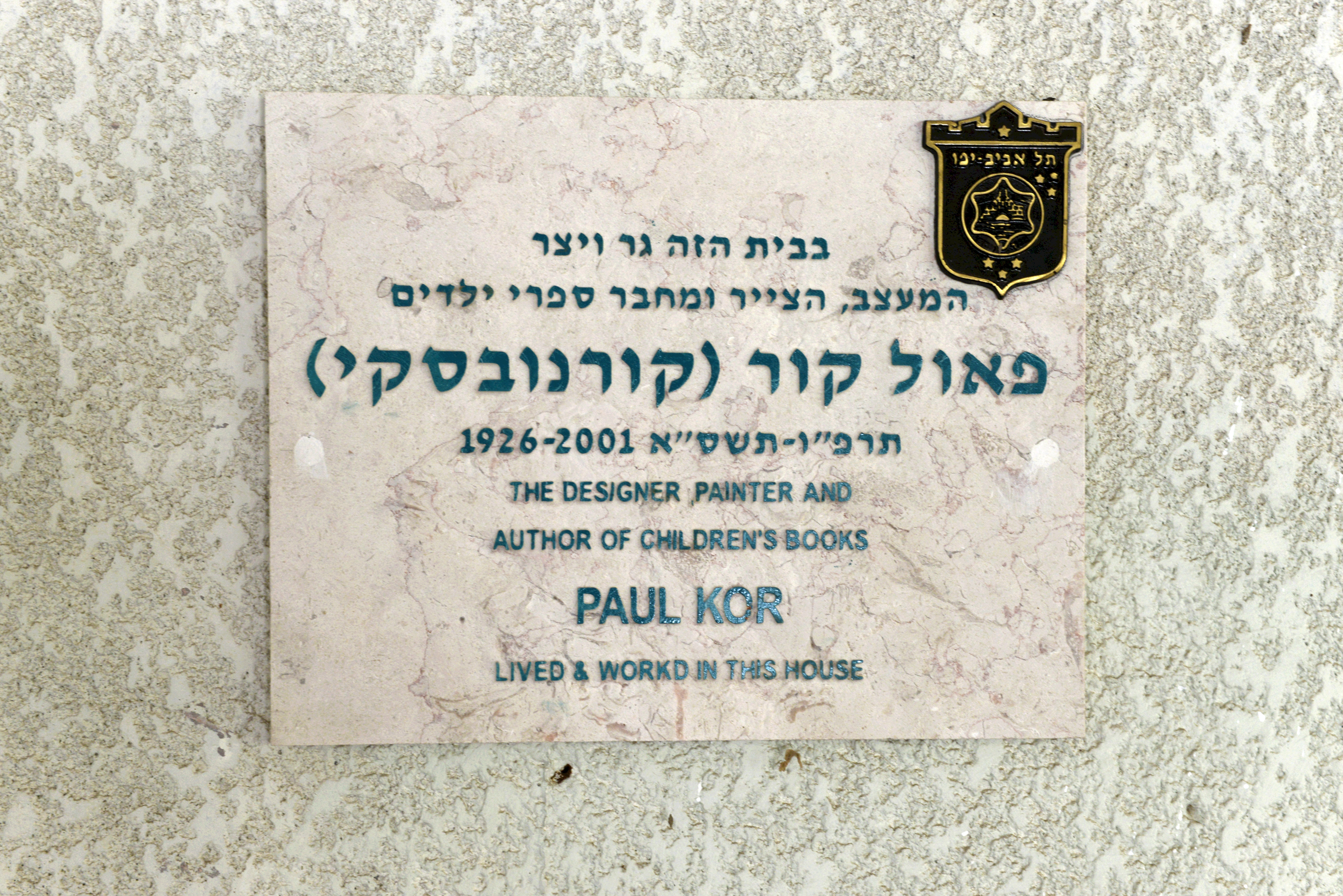 שלט על ביתו של האומן פאול קור